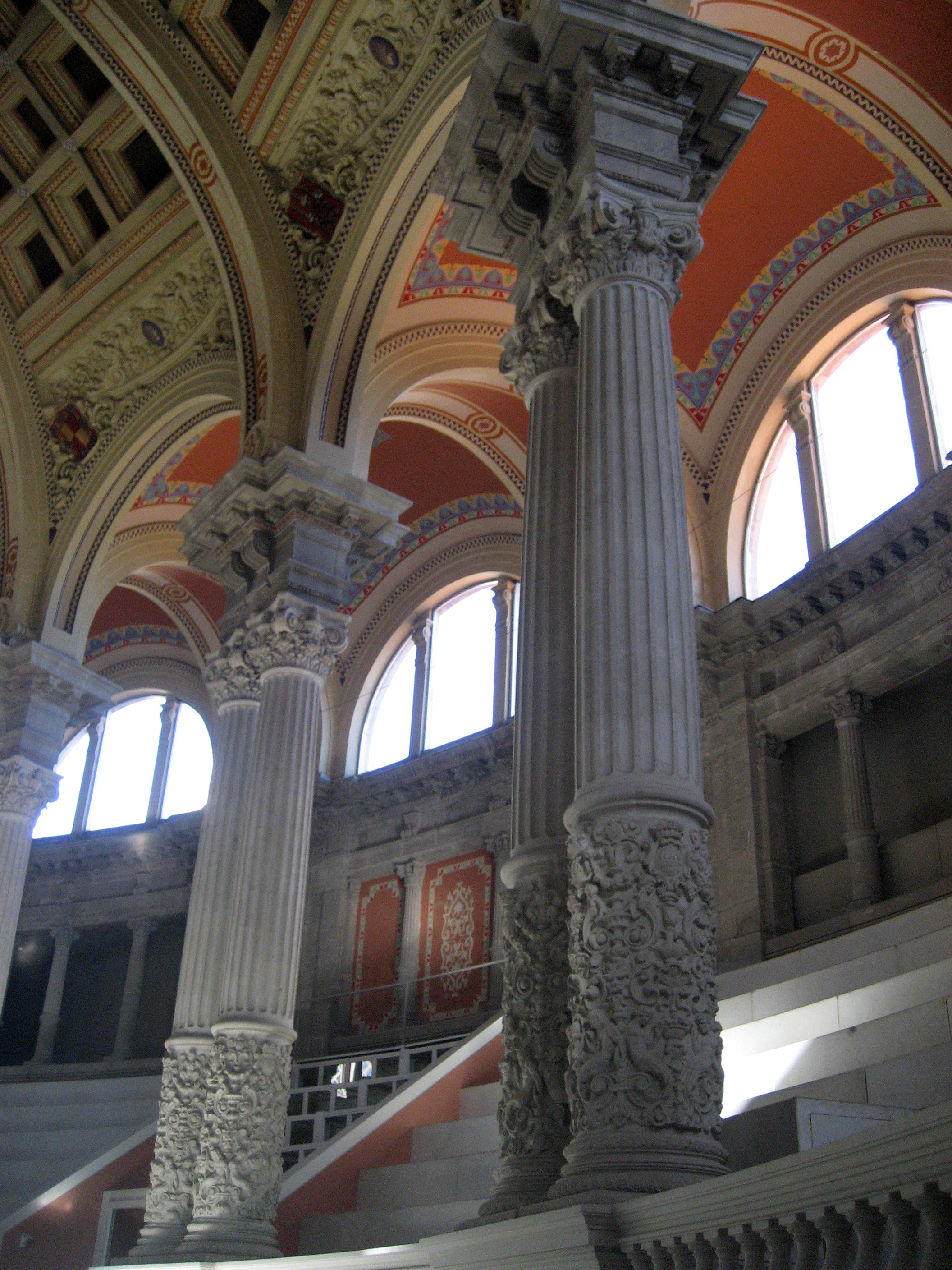 Columnas del Gran Salón del Palacio Nacional de Barcelona, Cataluña. Spain